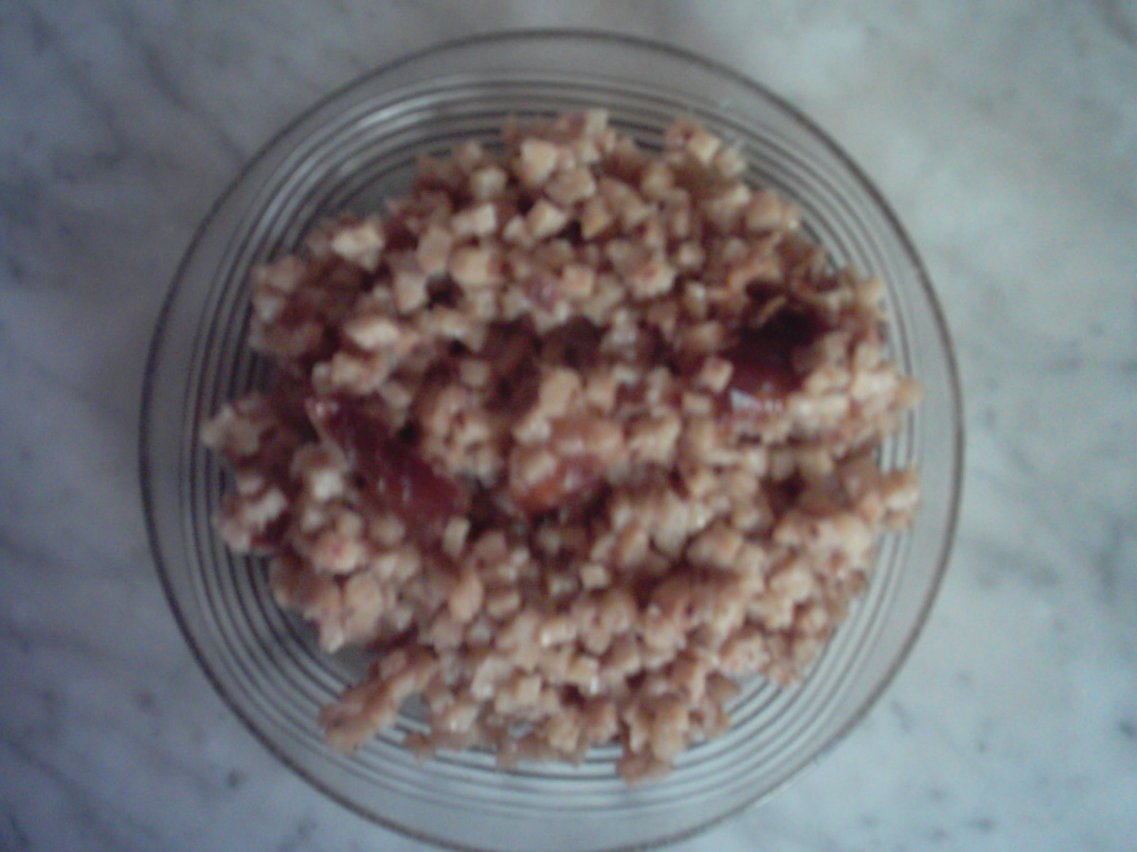 la rfissa